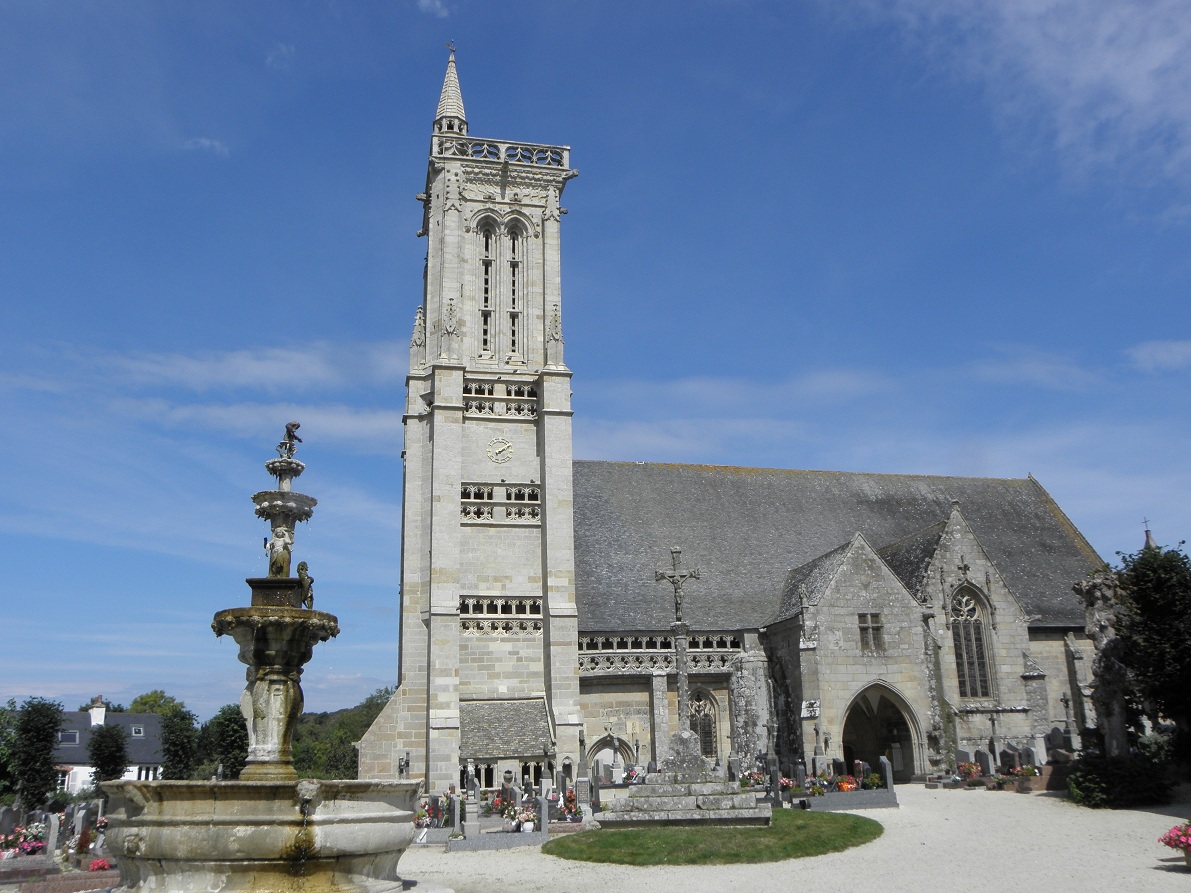 Fontaine et église de Saint-Jean-du-Doigt (29). .